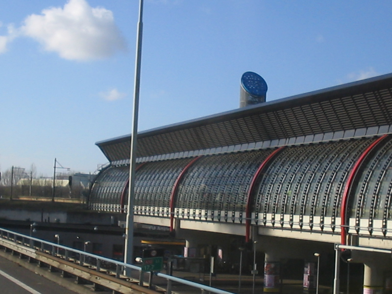 Amsterdam RAI vanaf A10